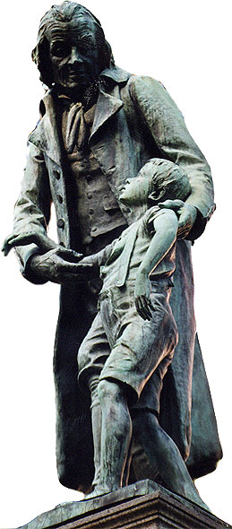 Denkmal von Heinrich Pestalozzi in Zürich